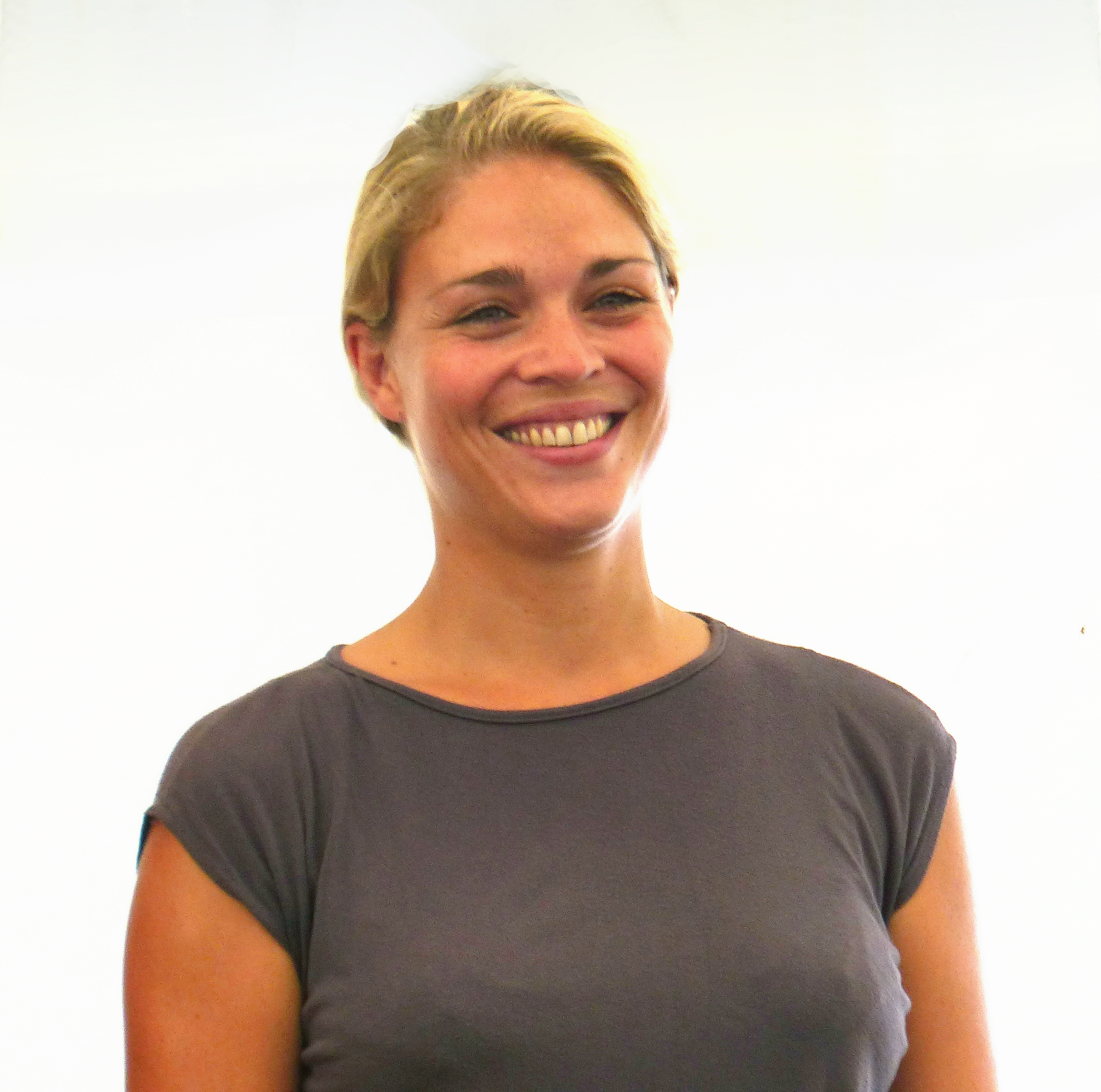 Jelena Mitschke (Britta Thies) auf der Bühne beim Rote Rosen-Fantag 2013, 28.07.2013, Lüneburg